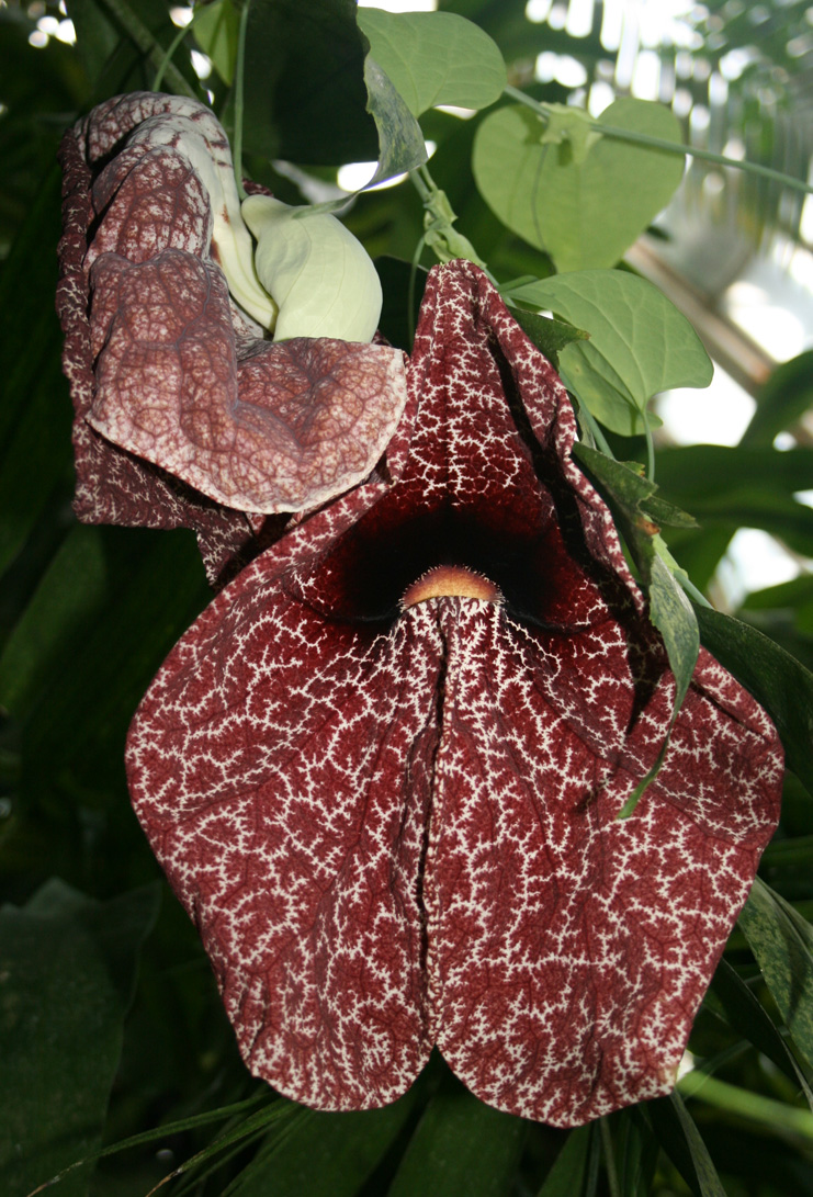 Eine Pflanze, deren Eindeutige Bestimmung mir nicht klar ist; hier hochgeladen, um im Portal Lebewesen darum zu bitten, sie zu bestimmen. Bei Erfolg werde ich das Bild hier löschen und eine bessere Version bei Commons hochladen.